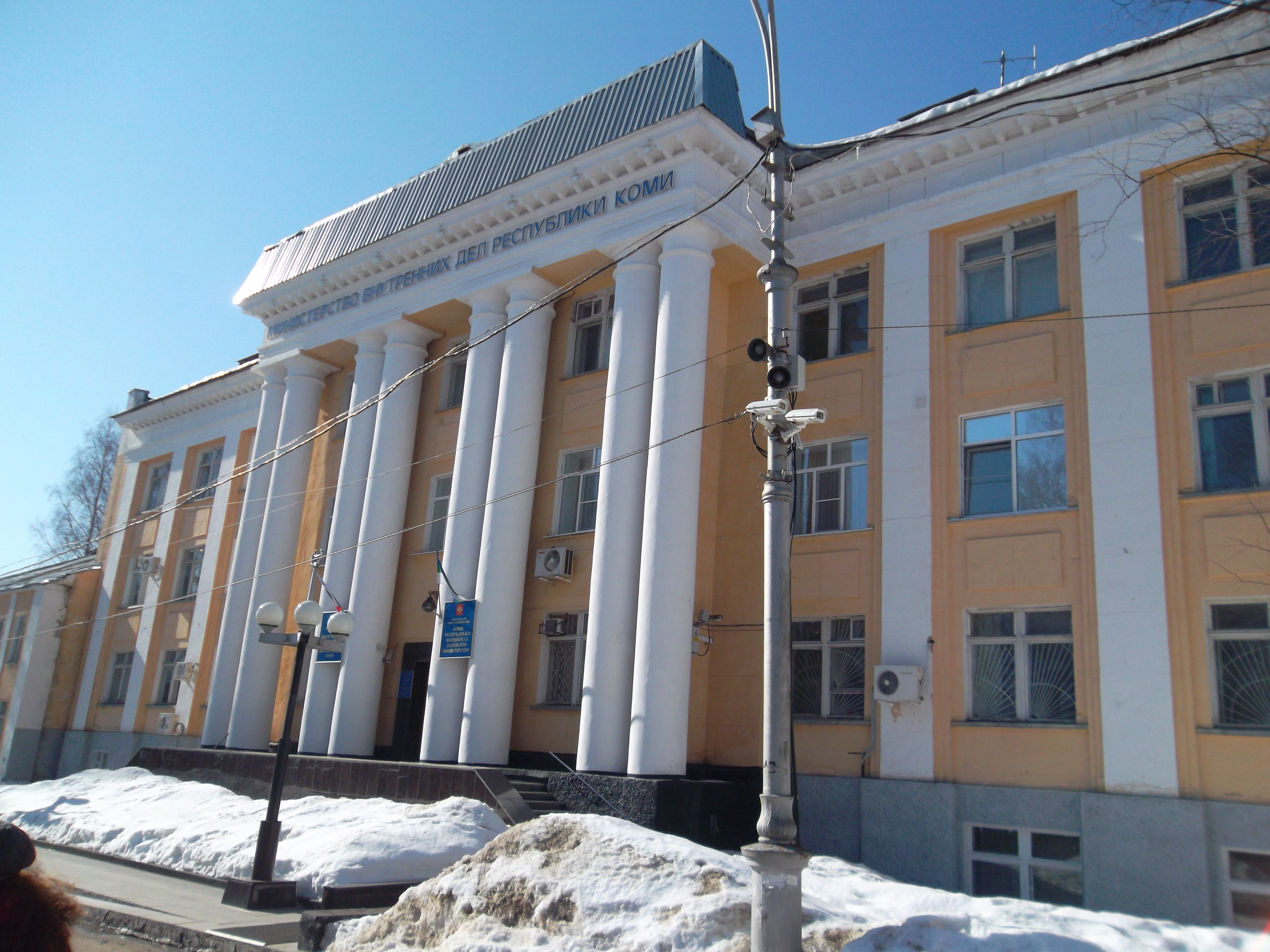 Министерство внутренних дел Республики Коми.Коми: Коми Республикаса Пытшкöсса делöяслöн министерство.